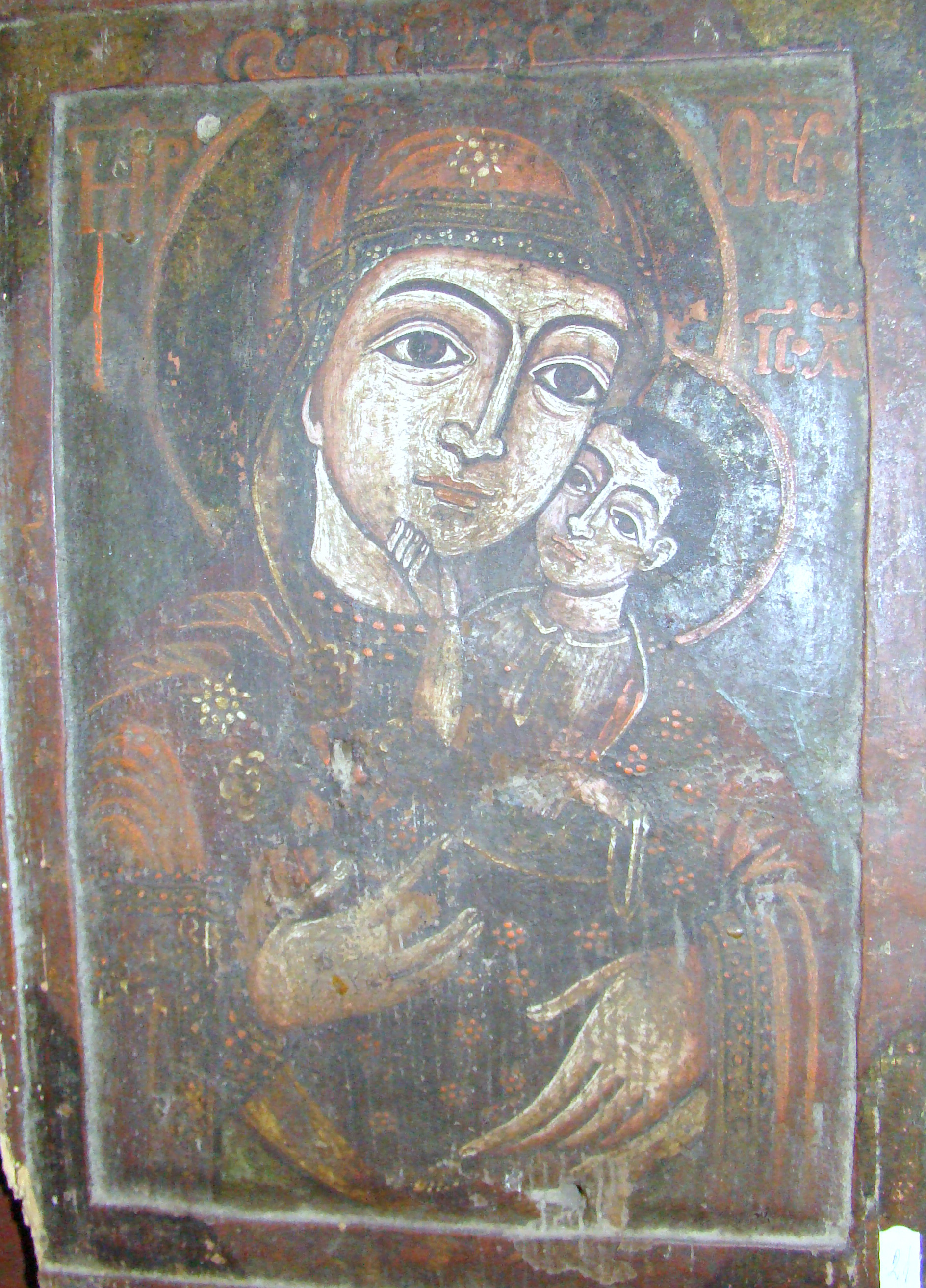 Biserica de lemn din Tinca, județul Bihor